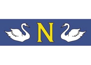 Bandeira do Município de Bom Jardim, RJ, Brasil